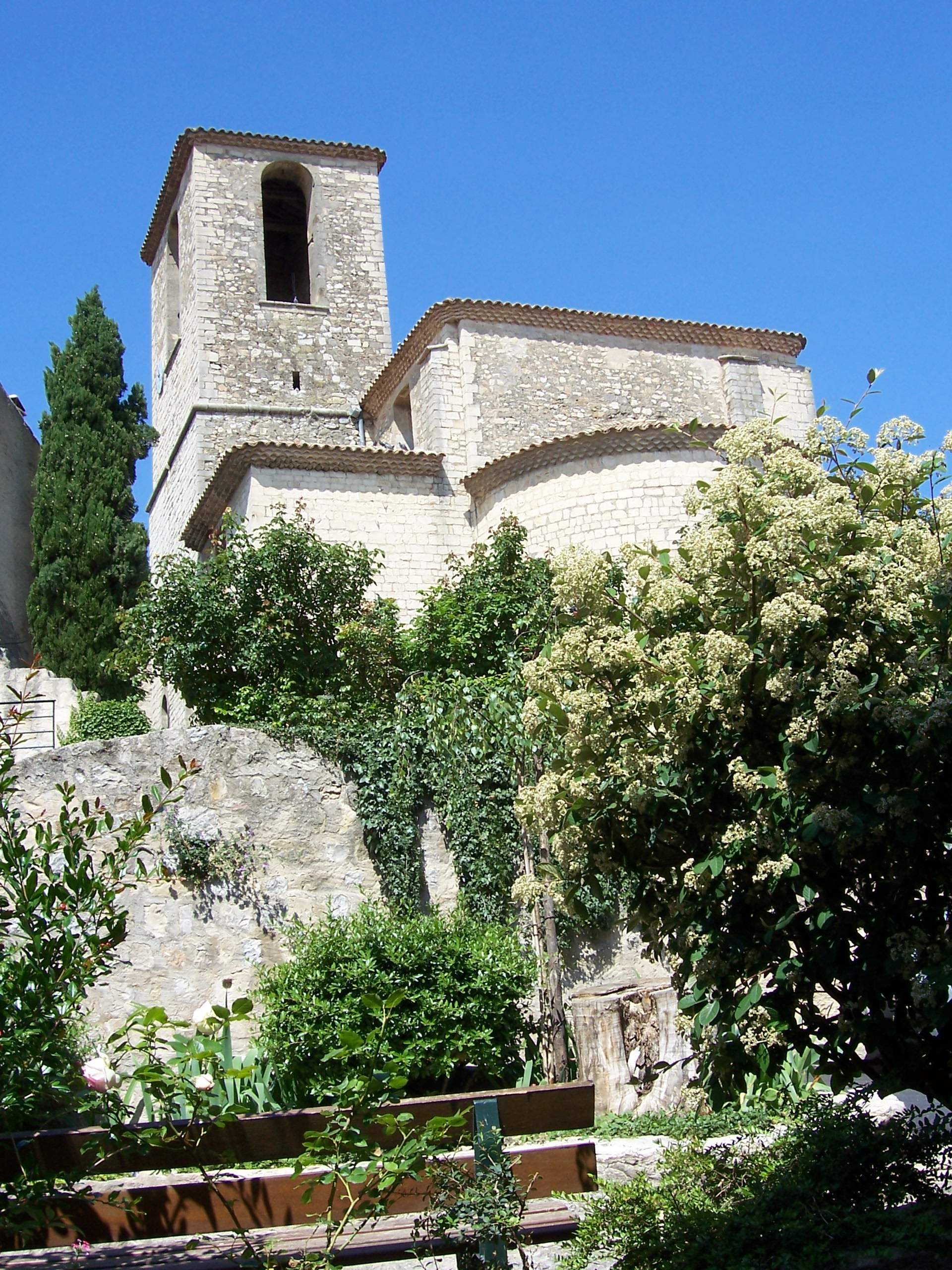 Eglise romane de Beaumont-de-Pertuis